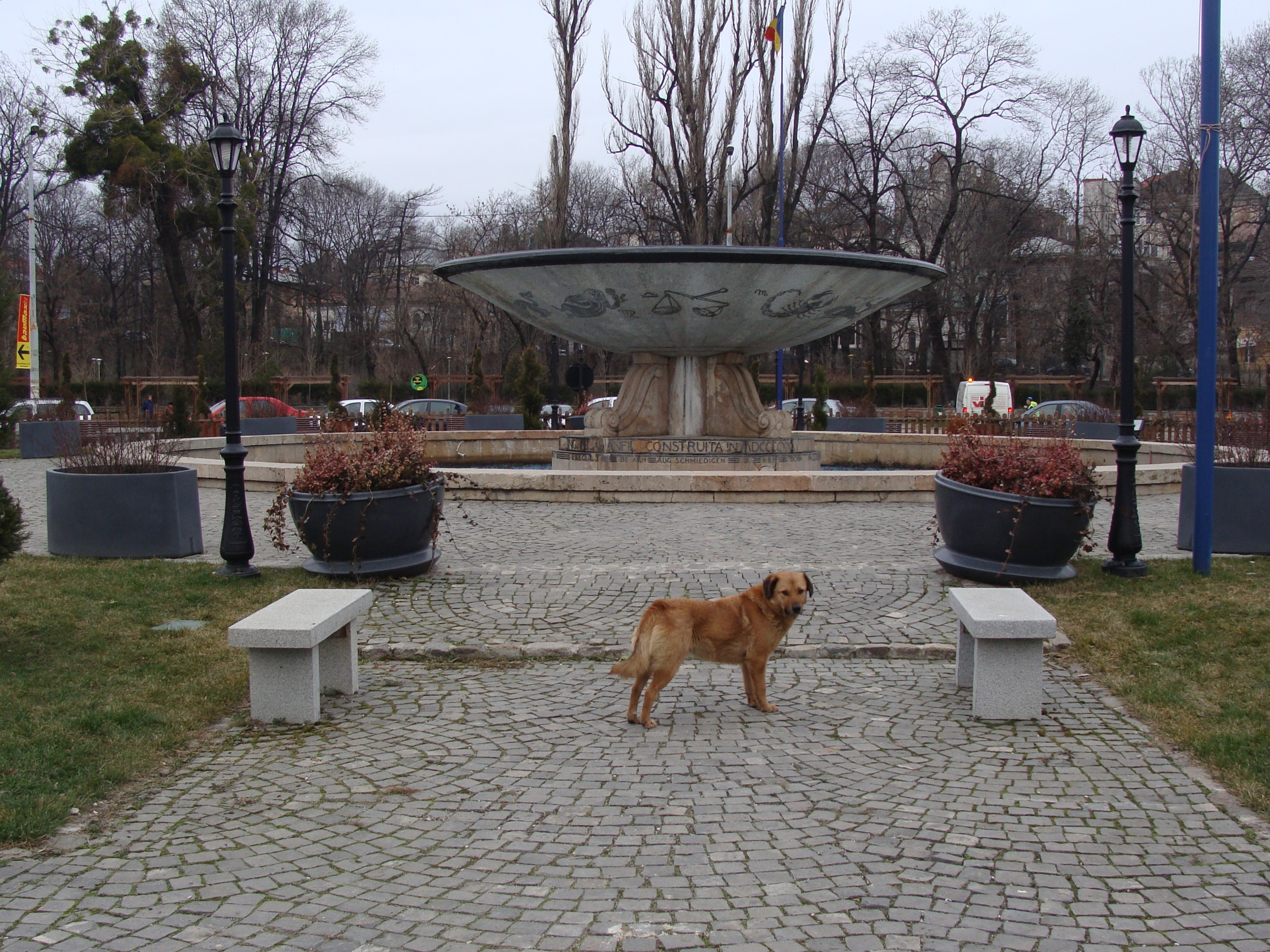 Fântâna Zodiac